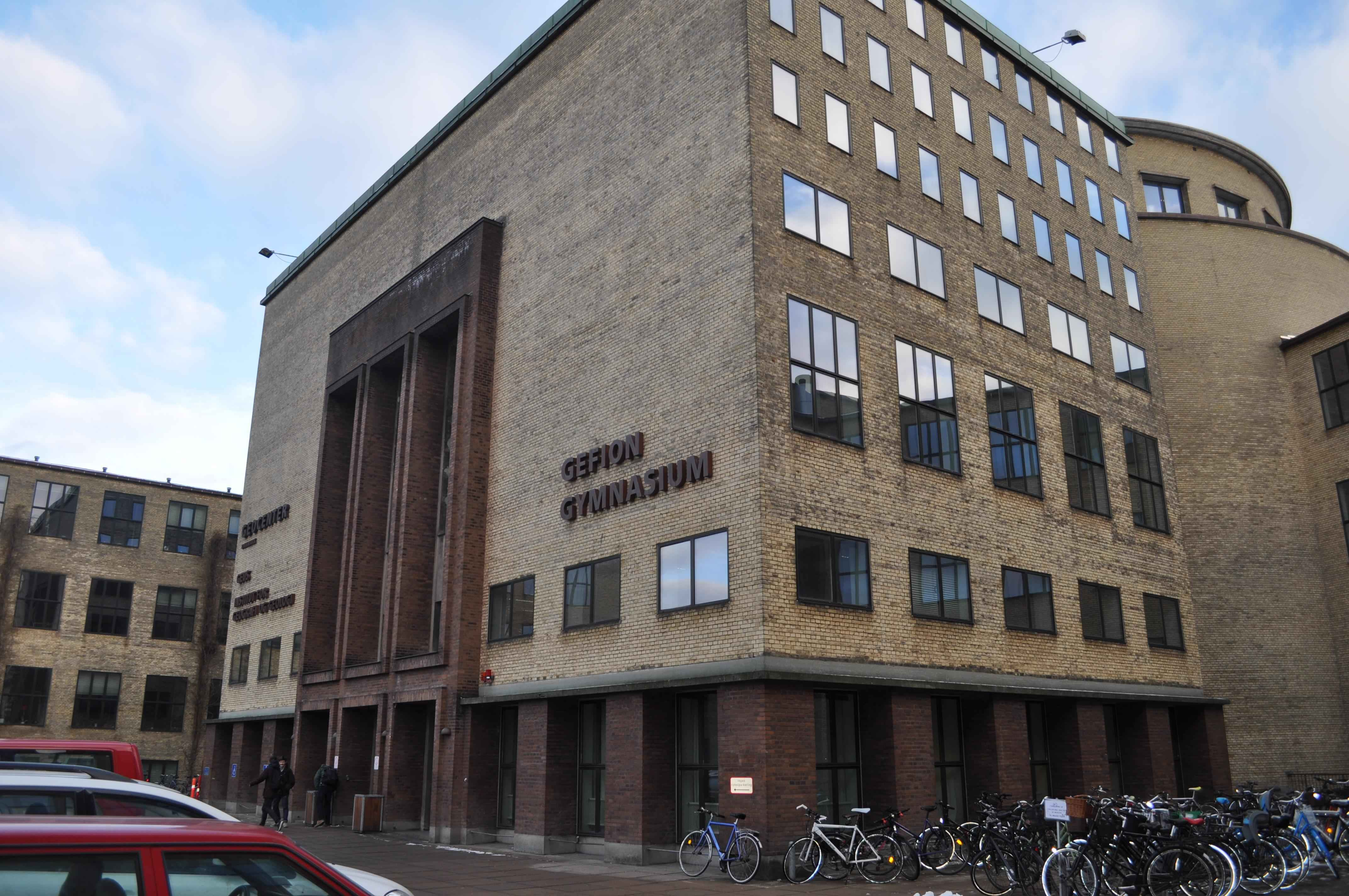 Gefion Gymnasium set fra parkeringspladsen